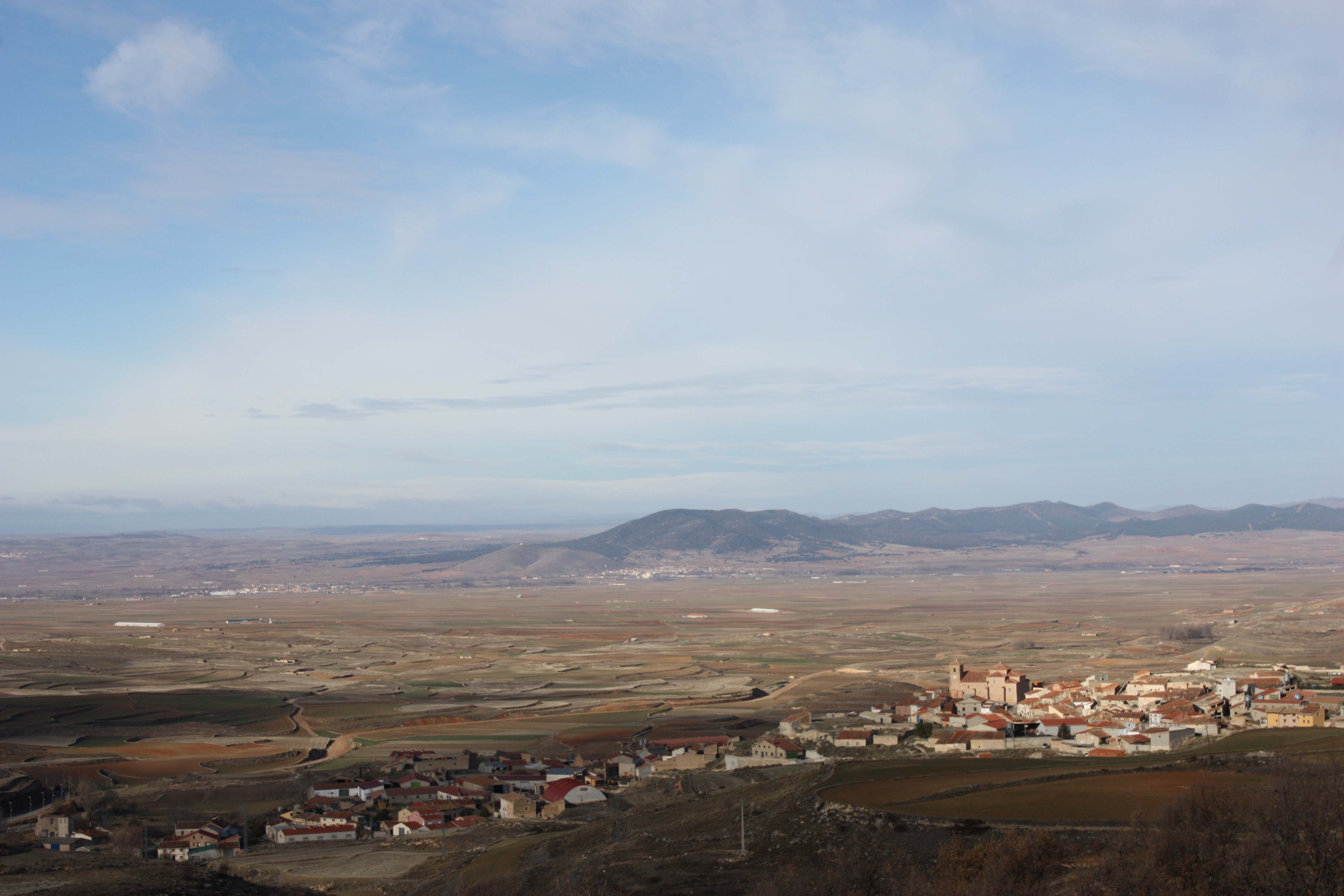 Fotografía Comarca del Jiloca - Vista general Bañón y Valle Jiloca